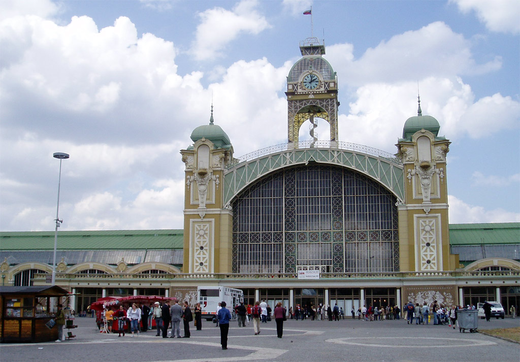 Pražské výstaviště v Holešovicích, Svět knihy 2007